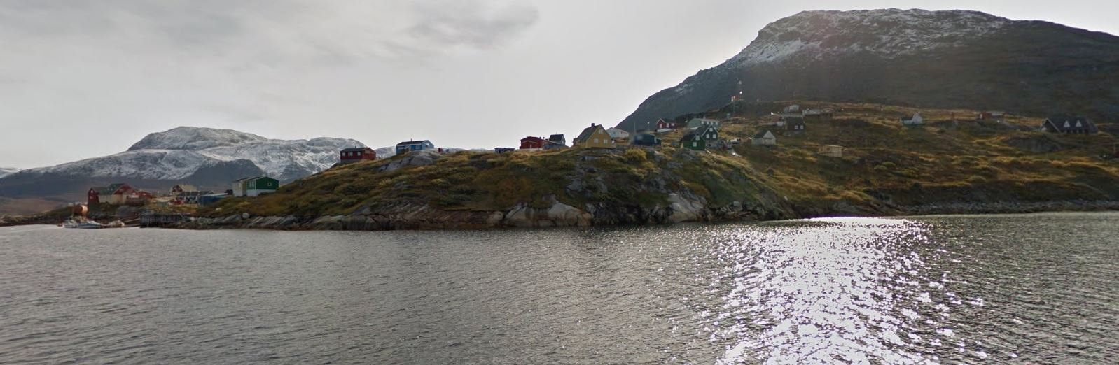 Kapisillit